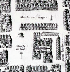 sur un plan de 1618 gravé par H Picart.